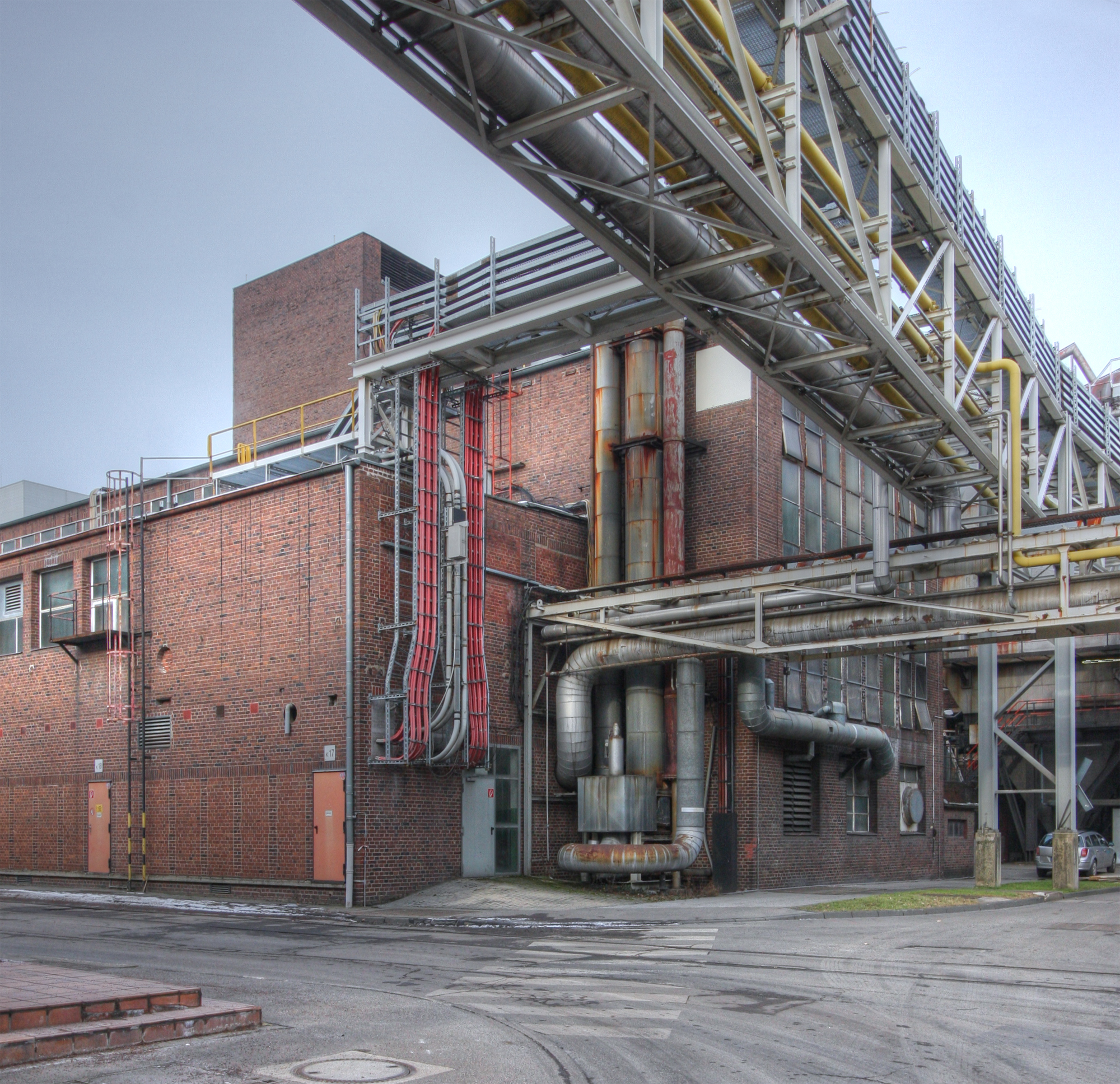 Kraftwerkshalle Zanders, Architekt: Dominikus Böhm, Bauzeit 1930–1931, Zustand 2009